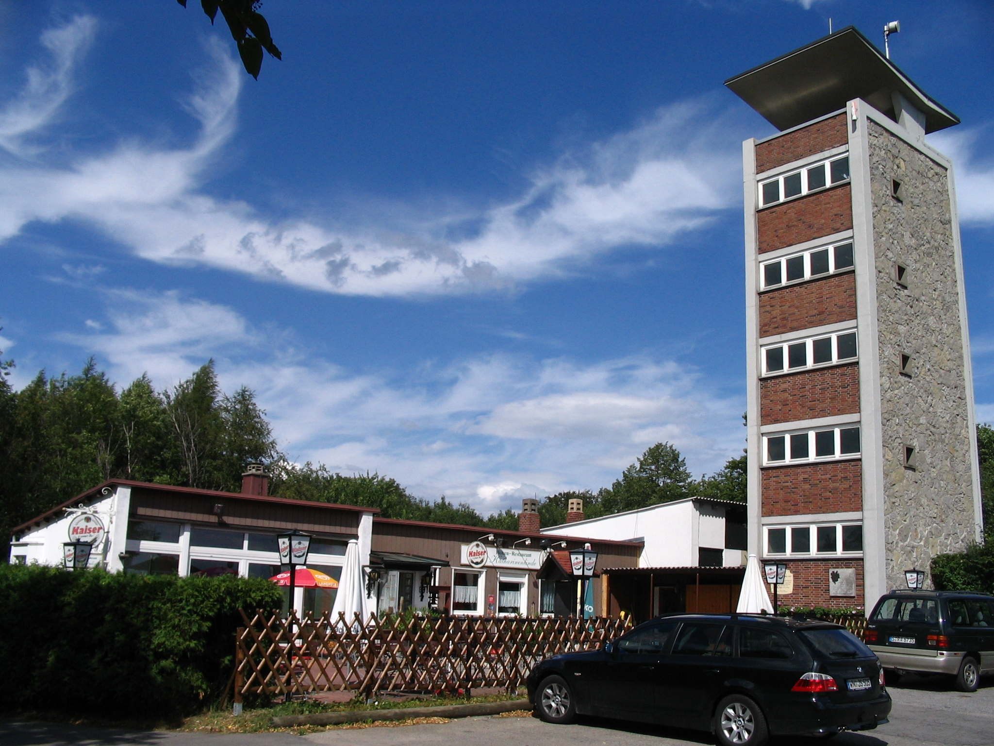 Der Katharinen-Turm in Esslingen